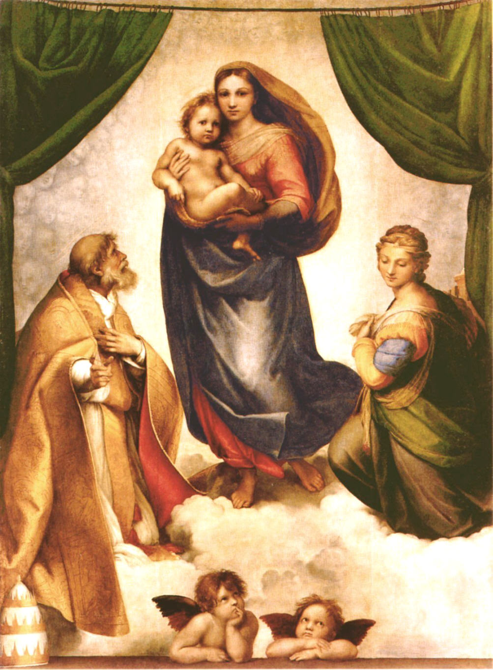 Raffael: Sixtinische Madonna, , Dresden (der Künstler ist über 70 Jahre tot.)